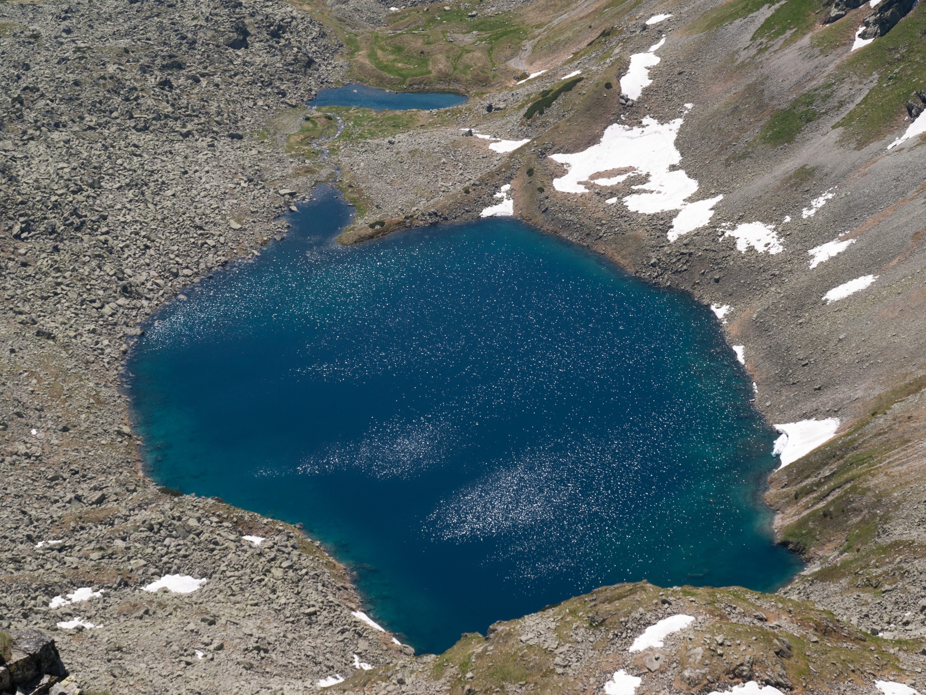 Zadni Staw i Wole Oko – widok ze Świnicy.